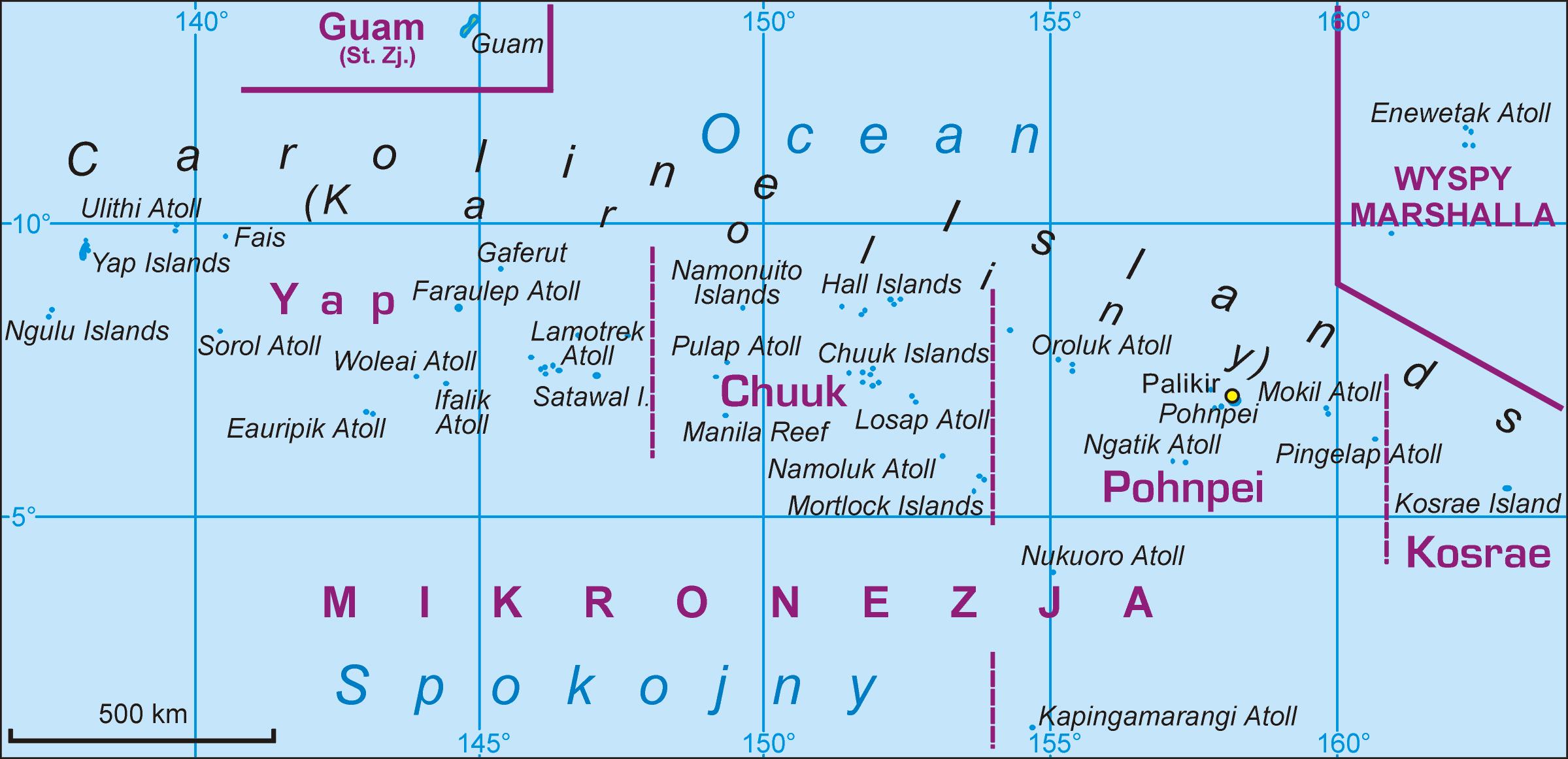 Mapa Sfederowanych Stanów Mikronezji. Autor Aotearoa